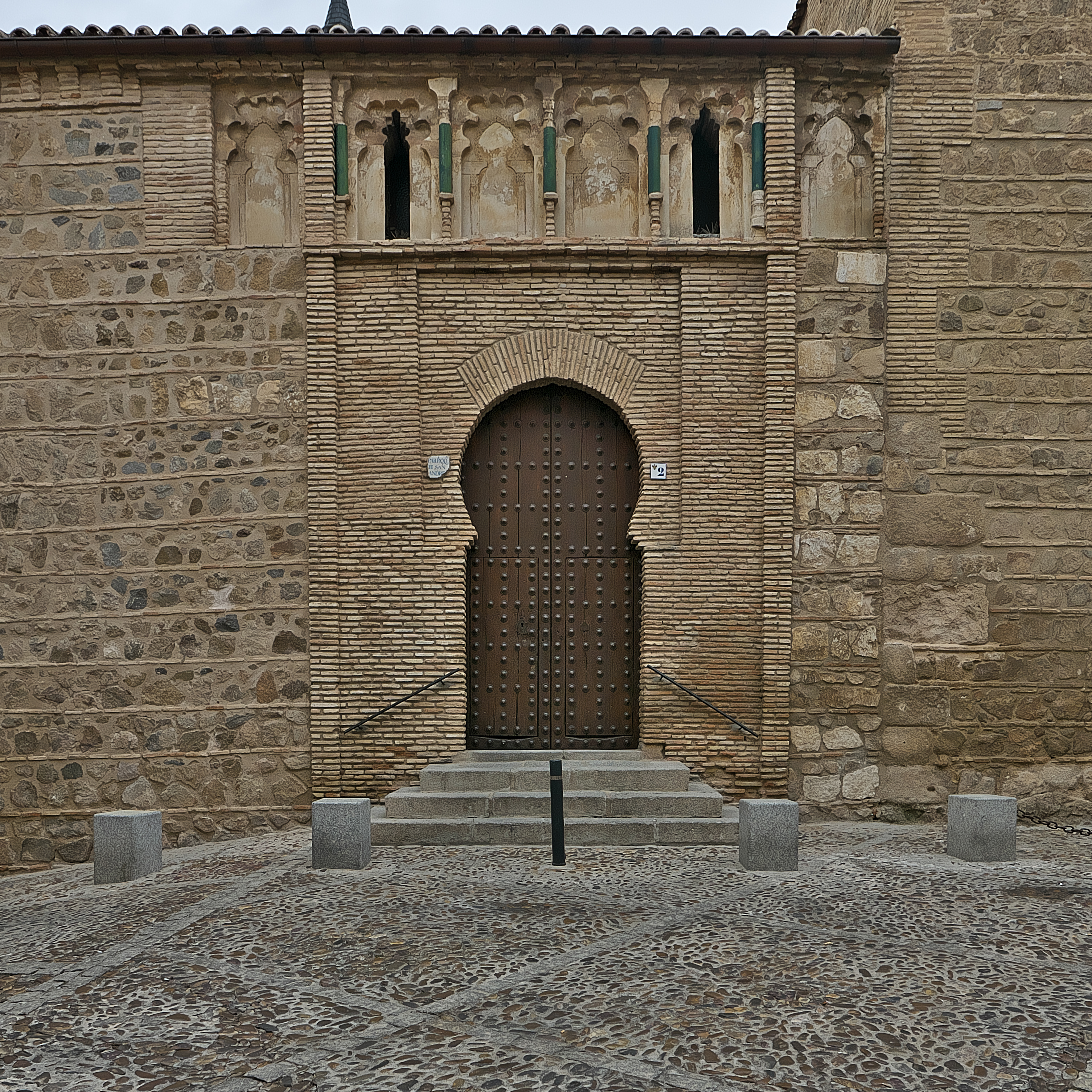 Portada mudéjar de una de las principales iglesias toledanas del siglo XII.